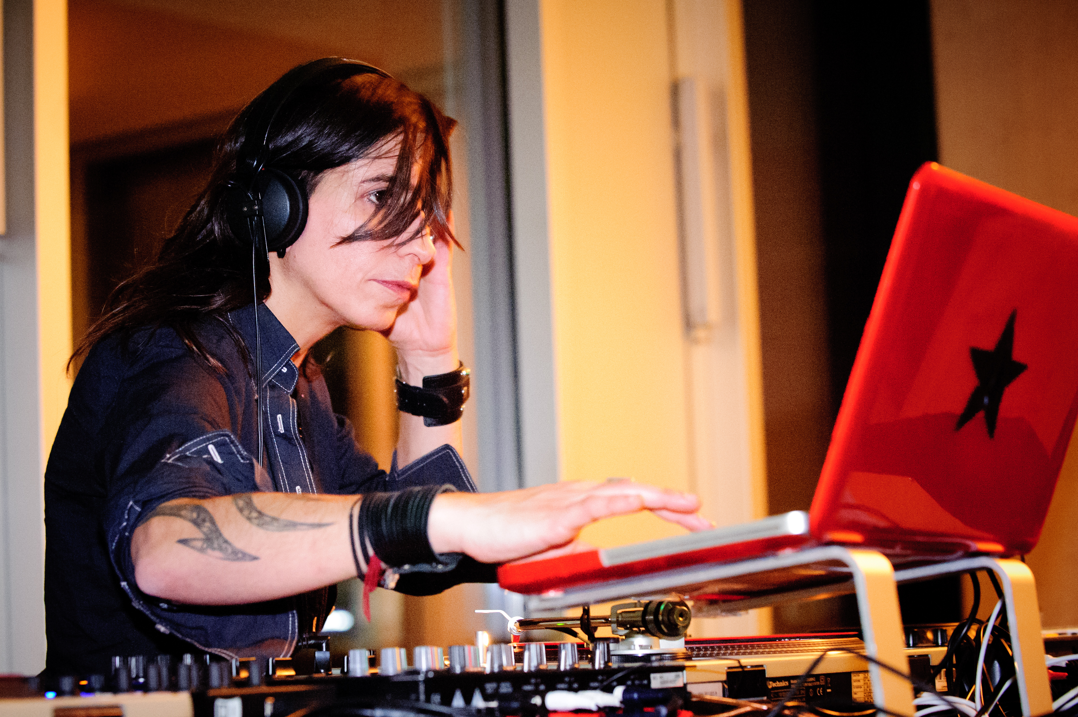 Anne-Klein-Frauenpreis 2012 Mit fast 400 Gästen war die Verleihung des ersten Anne-Klein-Frauenpreises an die Menschenrechtsaktivistin Dr. Nivedita Prasad ein voller Erfolg. Die Geehrte nutzte die Veranstaltung nicht nur, um langjährigen Weggefährtinnen und Unterstützerinnen zu danken, sondern machte auch auf bestehende Missstände aufmerksam. Foto: Stephan Röhl